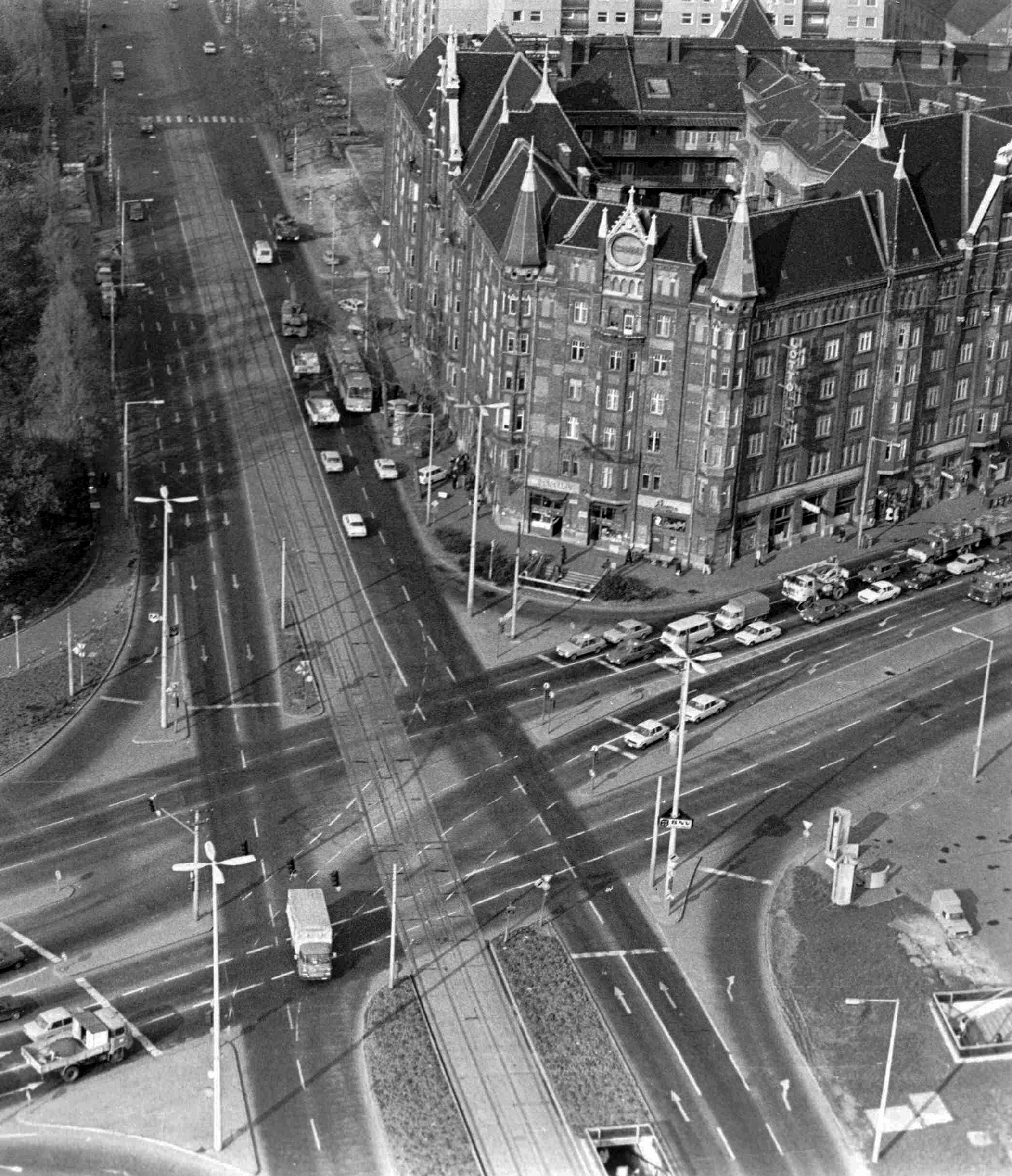 Nagyvárad tér a SOTE (ma Semmelweis Egyetem) Elméleti Tömb toronyépületének a tetejéről fényképezve. Location: Hungary, Budapest IX., Budapest VIII. Tags: Izh-brand, IFA-brand, Ikarus-brand, Lada-brand, Trabant-brand, Wartburg-brand, Avia-brand, Barkas-brand, picture, Soviet brand, Gerrman brand, Hungarian brand, Czechoslovak brand, automobile, commercial vehicle, bus, Budapest Title: Nagyvárad tér a SOTE (ma Semmelweis Egyetem) Elméleti Tömb toronyépületének a tetejéről fényképezve.